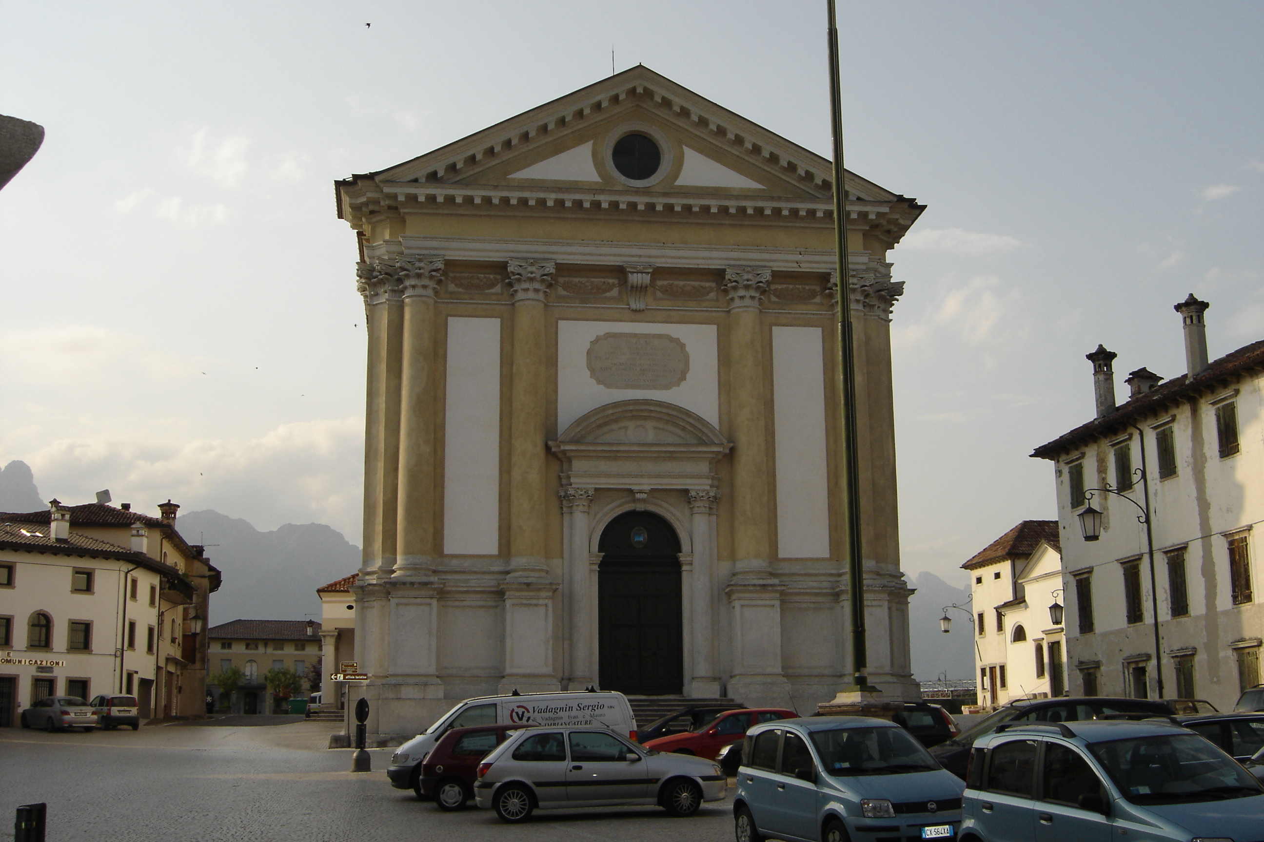 foto scattata da Jacobus